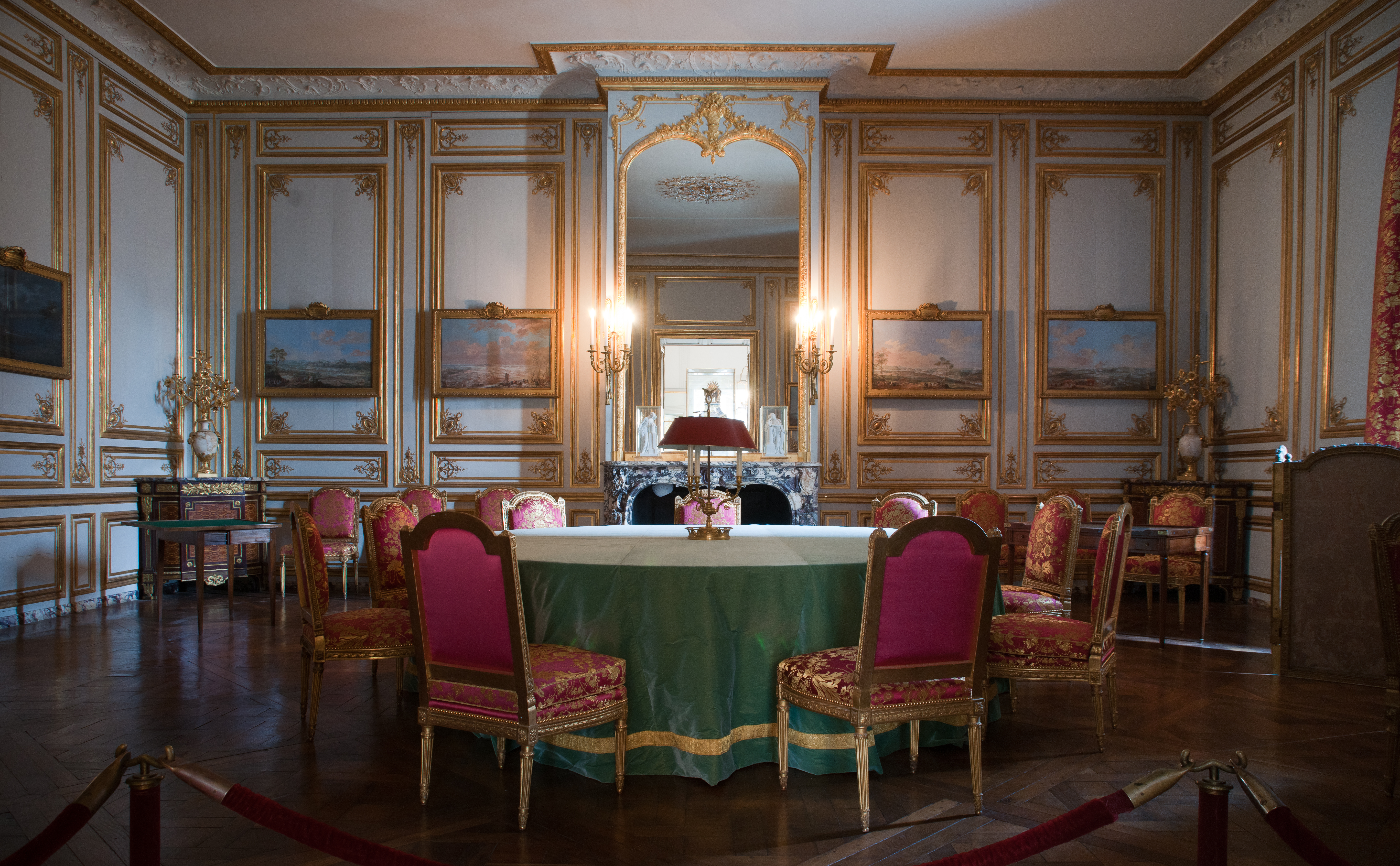 Château de Versailles, petit appartement du roi, cabinet des jeux de Louis XVI. Chaises de Jean-Baptiste Boulard (1785), encoignures de Jean-Henri Riesener (1774). This photograph was taken by a Wikimedian during the partnership between the Château de Versailles and Wikimédia France. Also see : Image provided by Château de Versailles